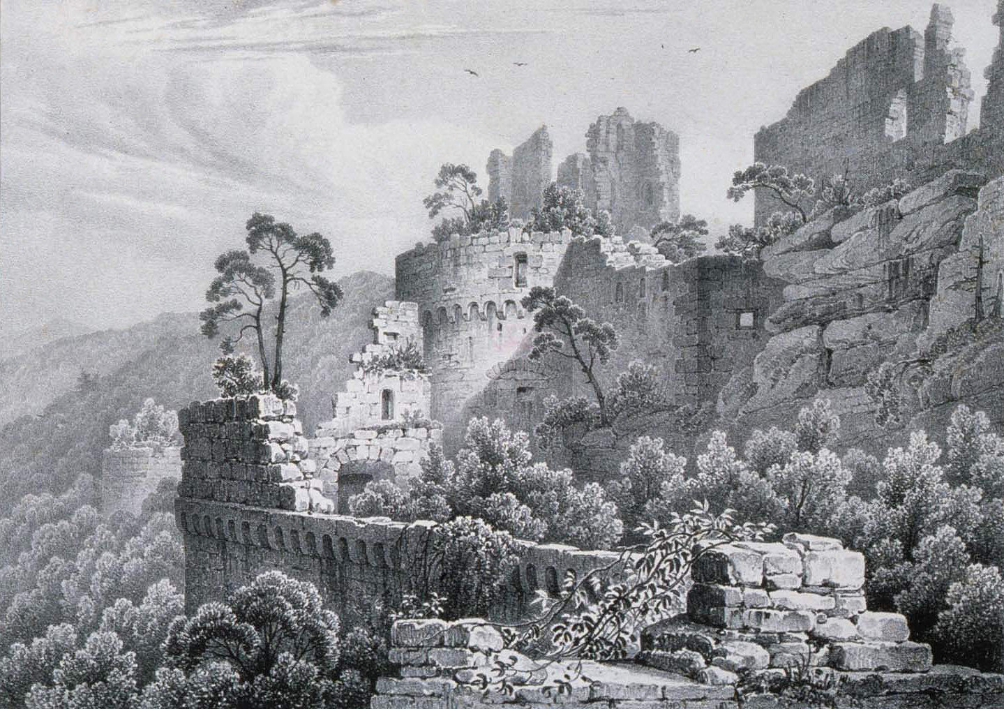 Burg Schöneck im Elsass, Lithographie des 19. Jh.